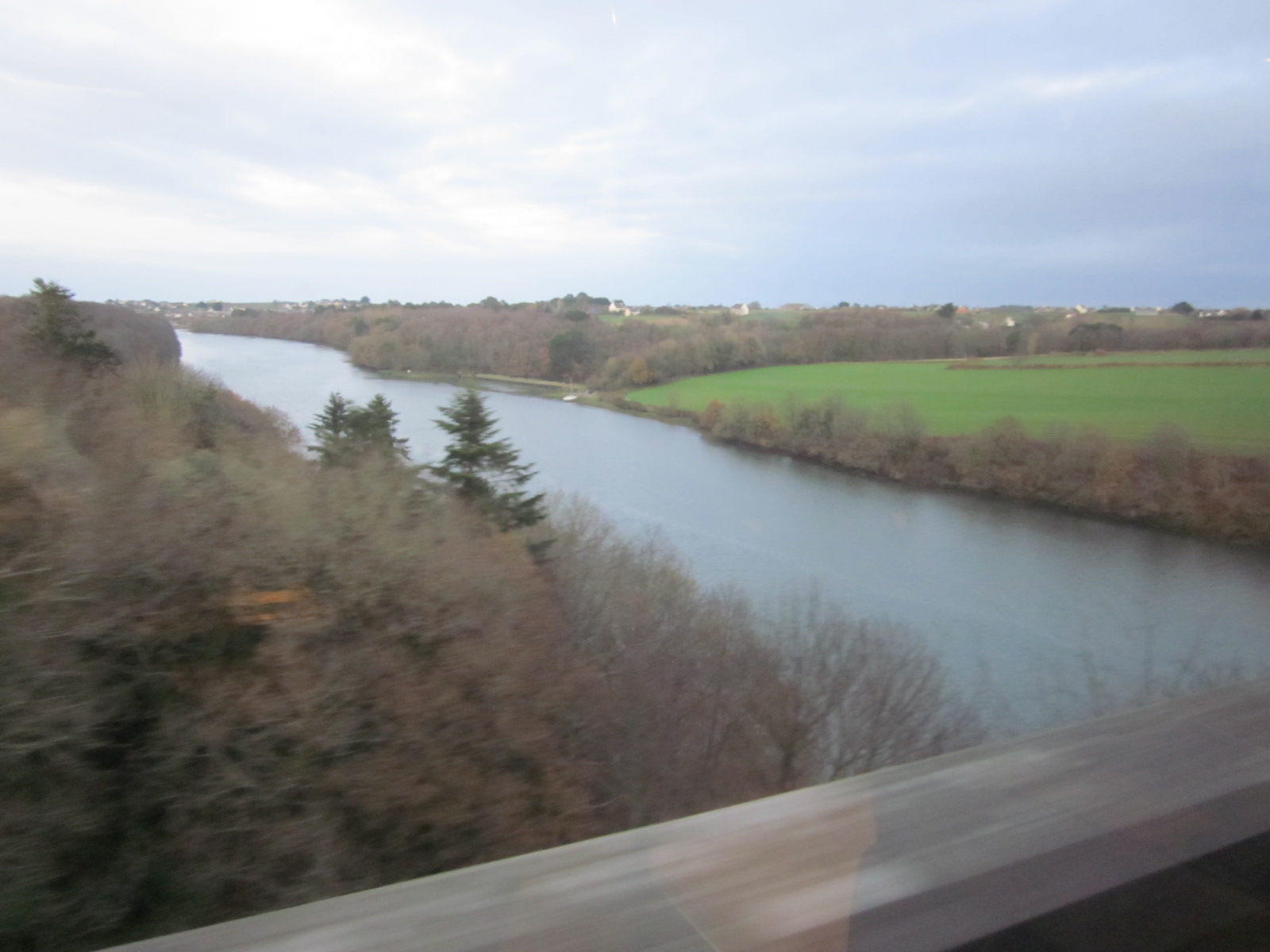 Panorama sur la Penzé, Finistère, France, prise d'un train, sur le viaduc de la Penzé, ligne Morlaix-Roscoff.